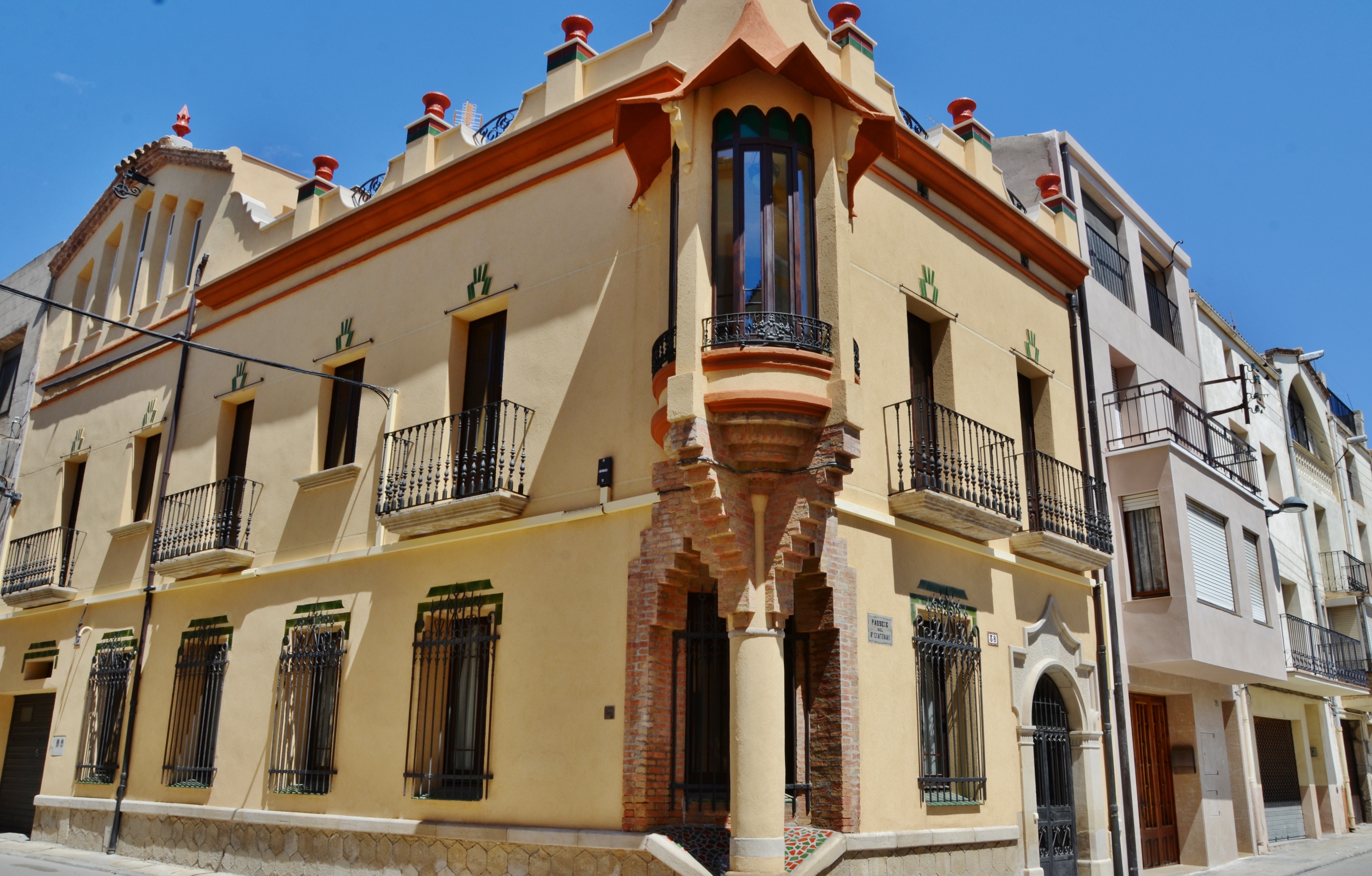 Can Garrofa (Sarral)